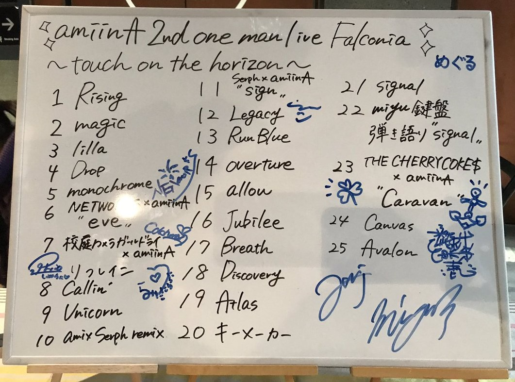 amiinAセトリボード